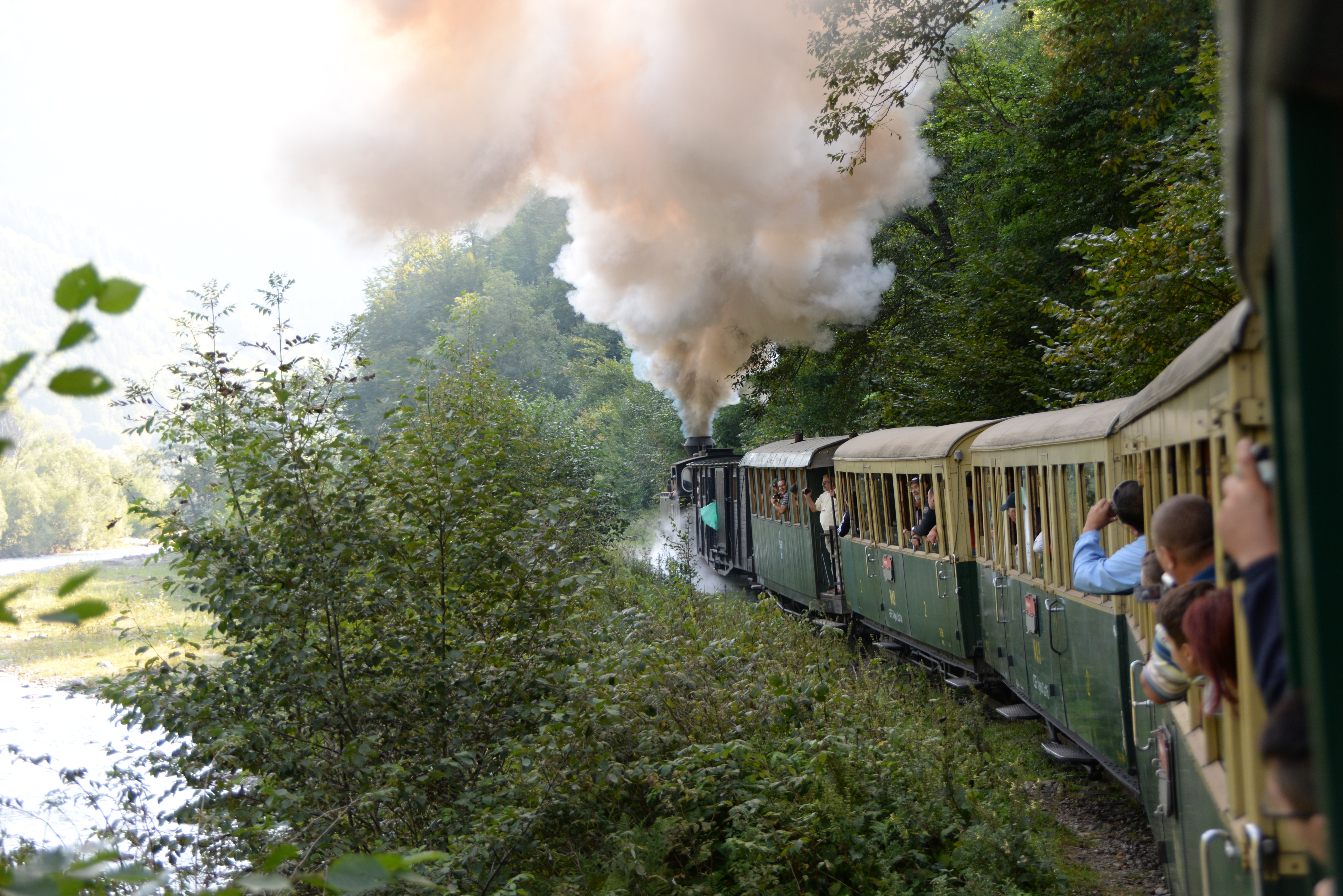 Cu mocanita pe Calea Ferara Forestiera (CFF) ingusta.